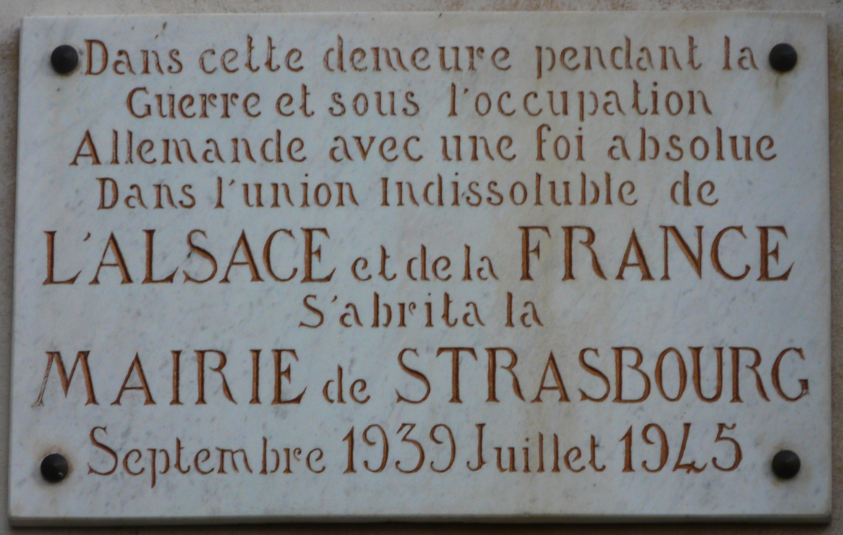 Plaque située sur le bâtiment qui a abrité la mairie de Strasbourg à Périgueux, Dordogne, France.